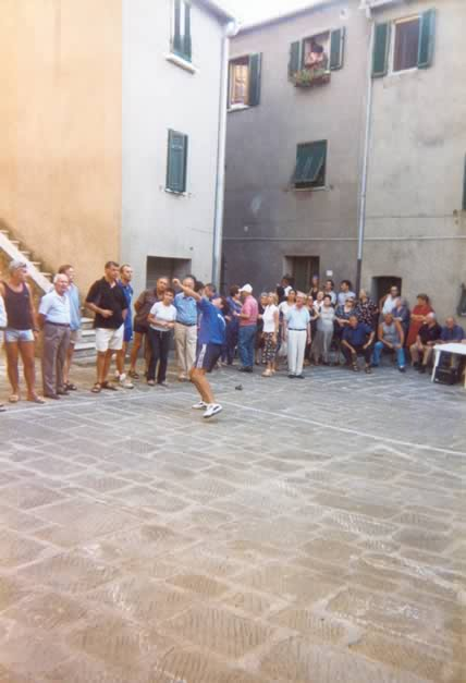 Autore: Utente:Trapanator; Fonte: Utente:Trapanator, foto amatoriale fatta da me nel settembre 2001. Descrizione: Palla Eh - Mando "di sopra", la specialitÃ di Alessandro Tosi